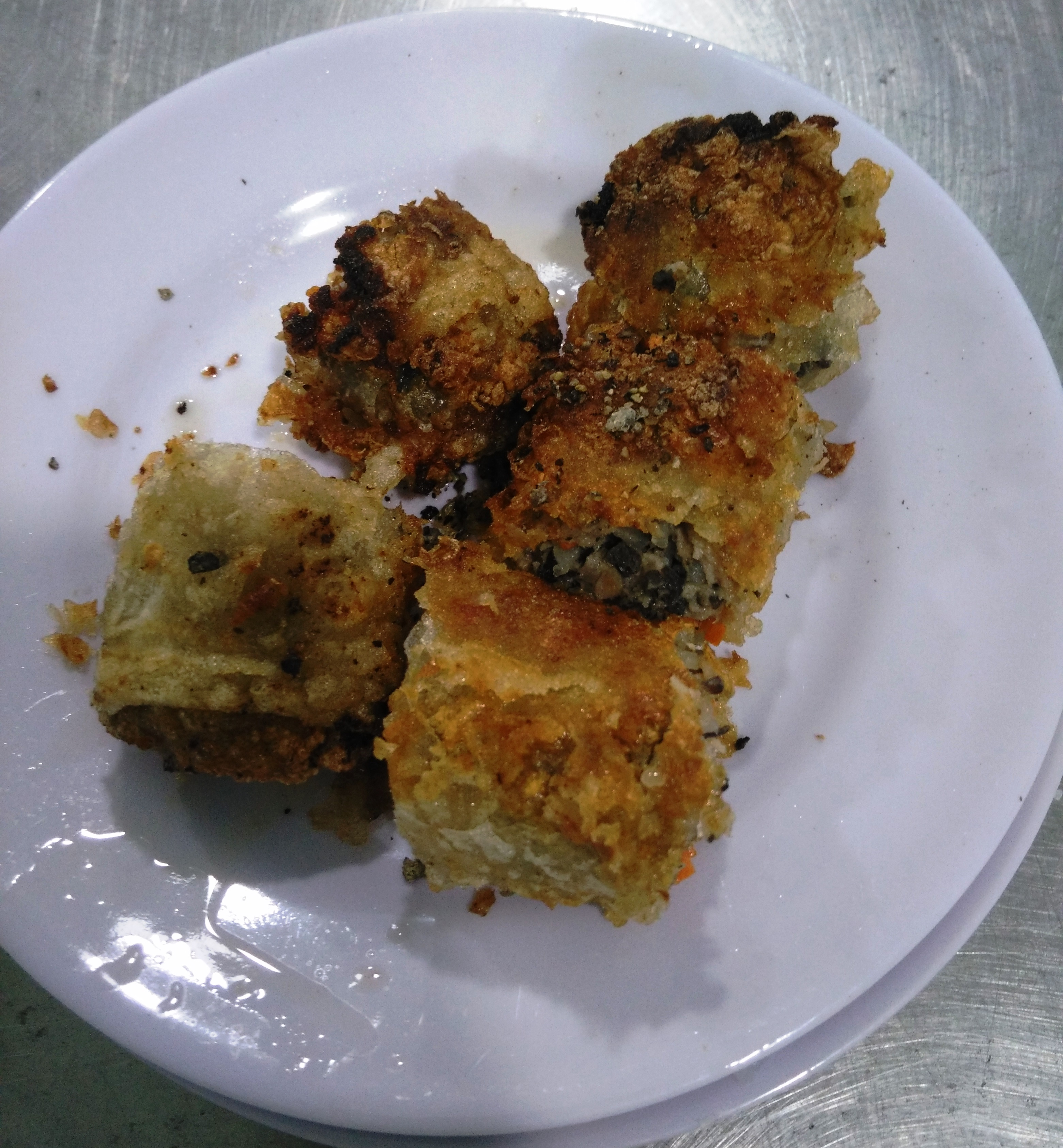 Nem cua bể Hà Nội tại Nguyễn Sơn, Tân Phú, tháng 9 năm 2018